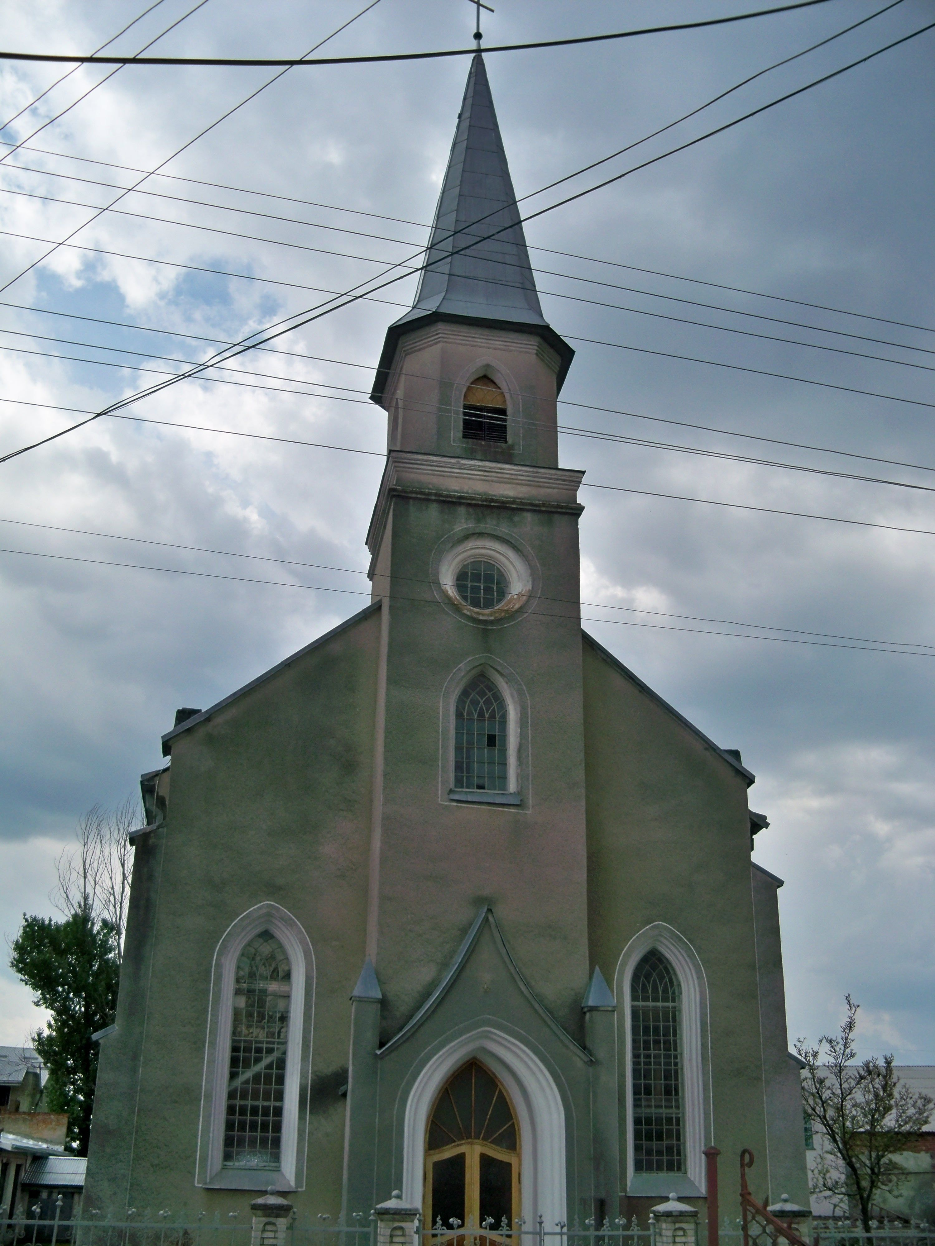 Церква Успення Пресвятої Богородиці (мур.), Стрий, вул. Успенська,2